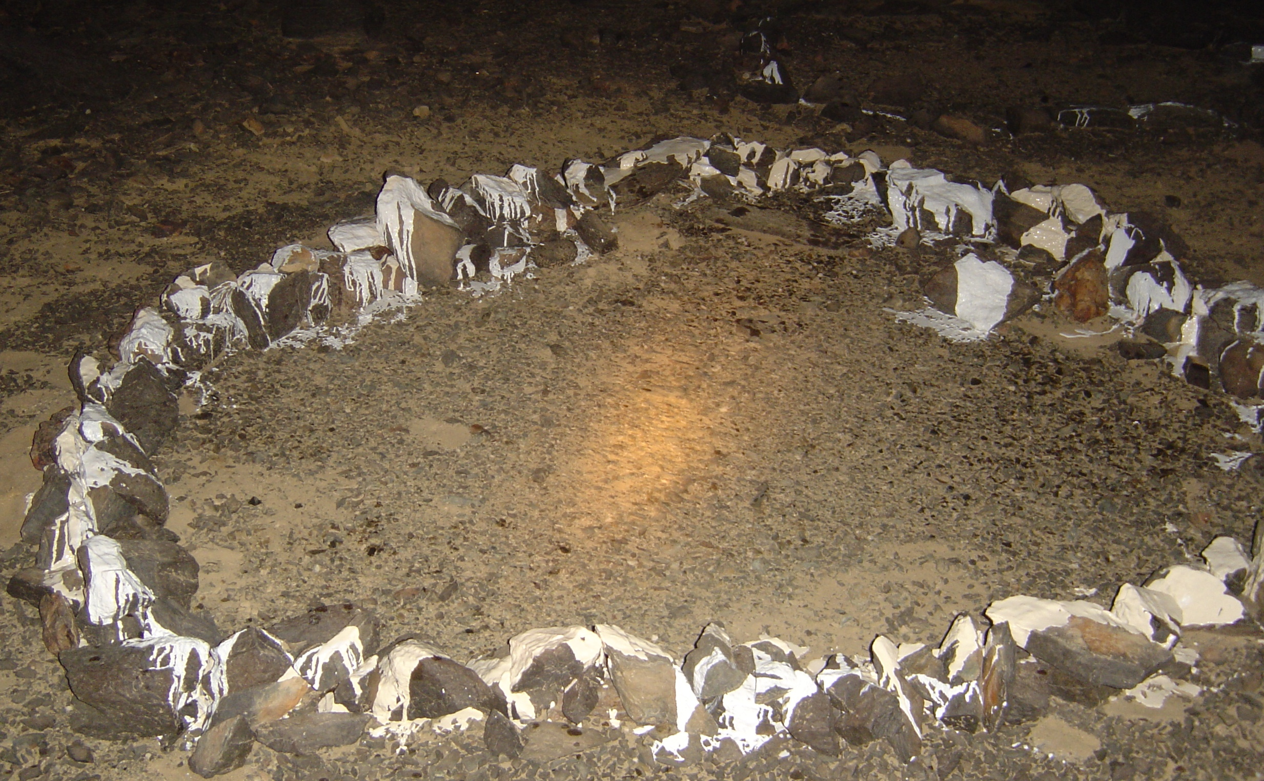 أحدث صور أخذت لضريح السيدة آمنة بنت وهب رضي الله عنه